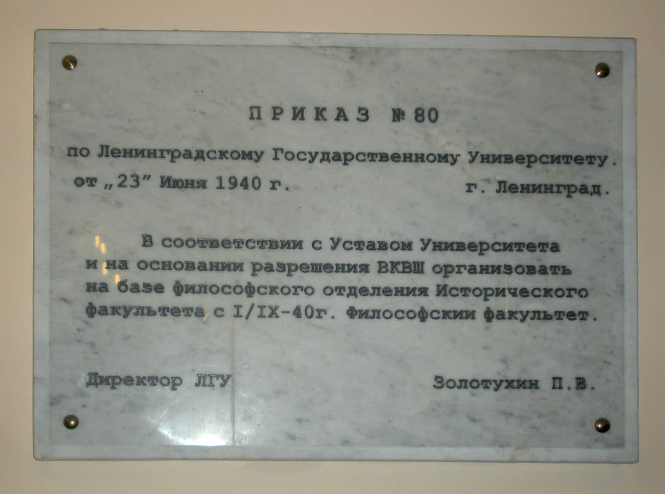 Мемориальная доска об учреждении факультета философии. Располагается на втором этаже данного факультета.